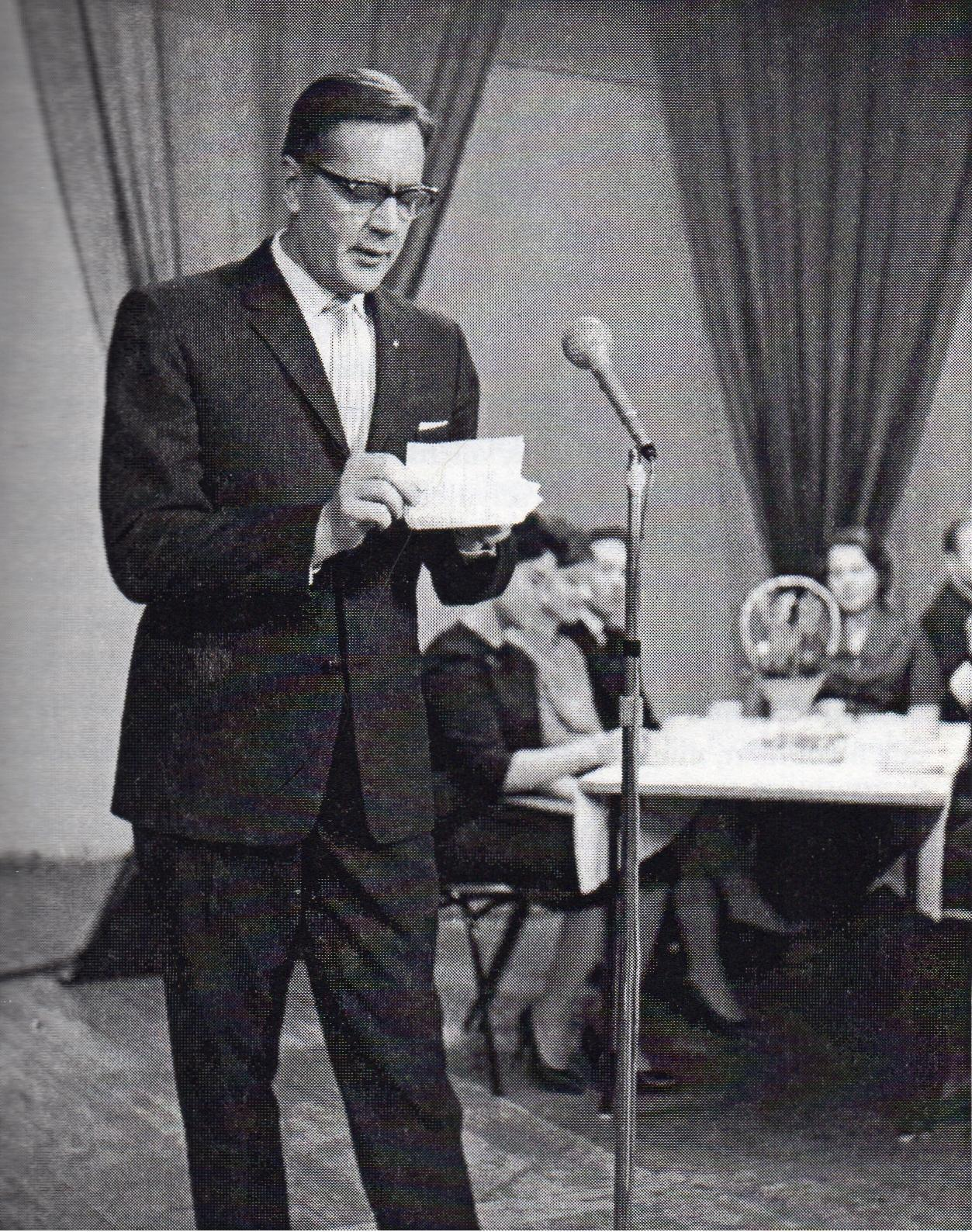 Suomalainen radio- ja televisiotoimittaja, majuri evp ja kamarineuvos Niilo Tarvajärvi (1914-2002) juontamassa Tervetuloa Aamukahville -ohjelmaa Tapaninpäivänä 1960.